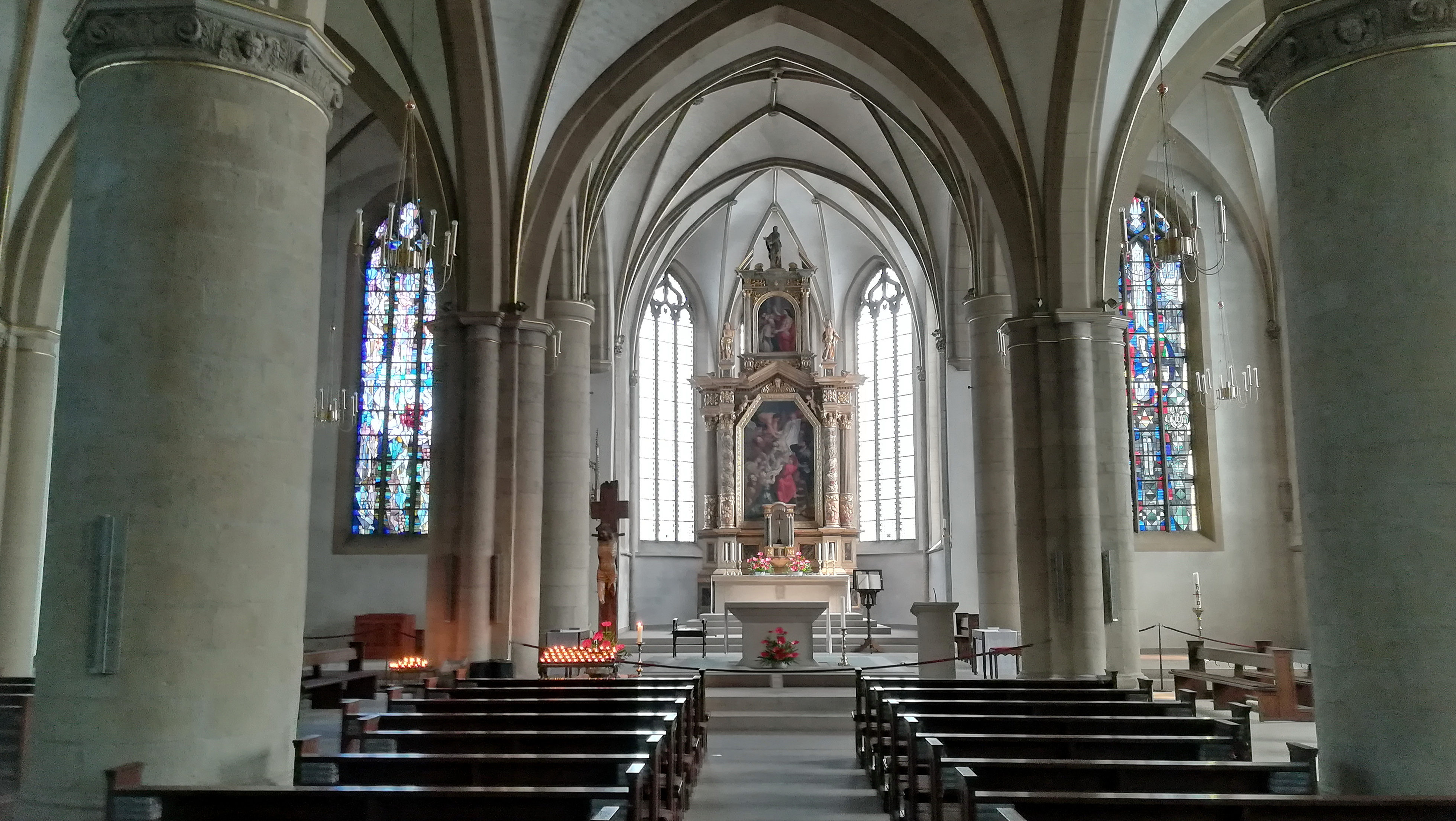 Die Kirche St. Peter ist die römisch-katholische Hauptkirche von Recklinghausen.